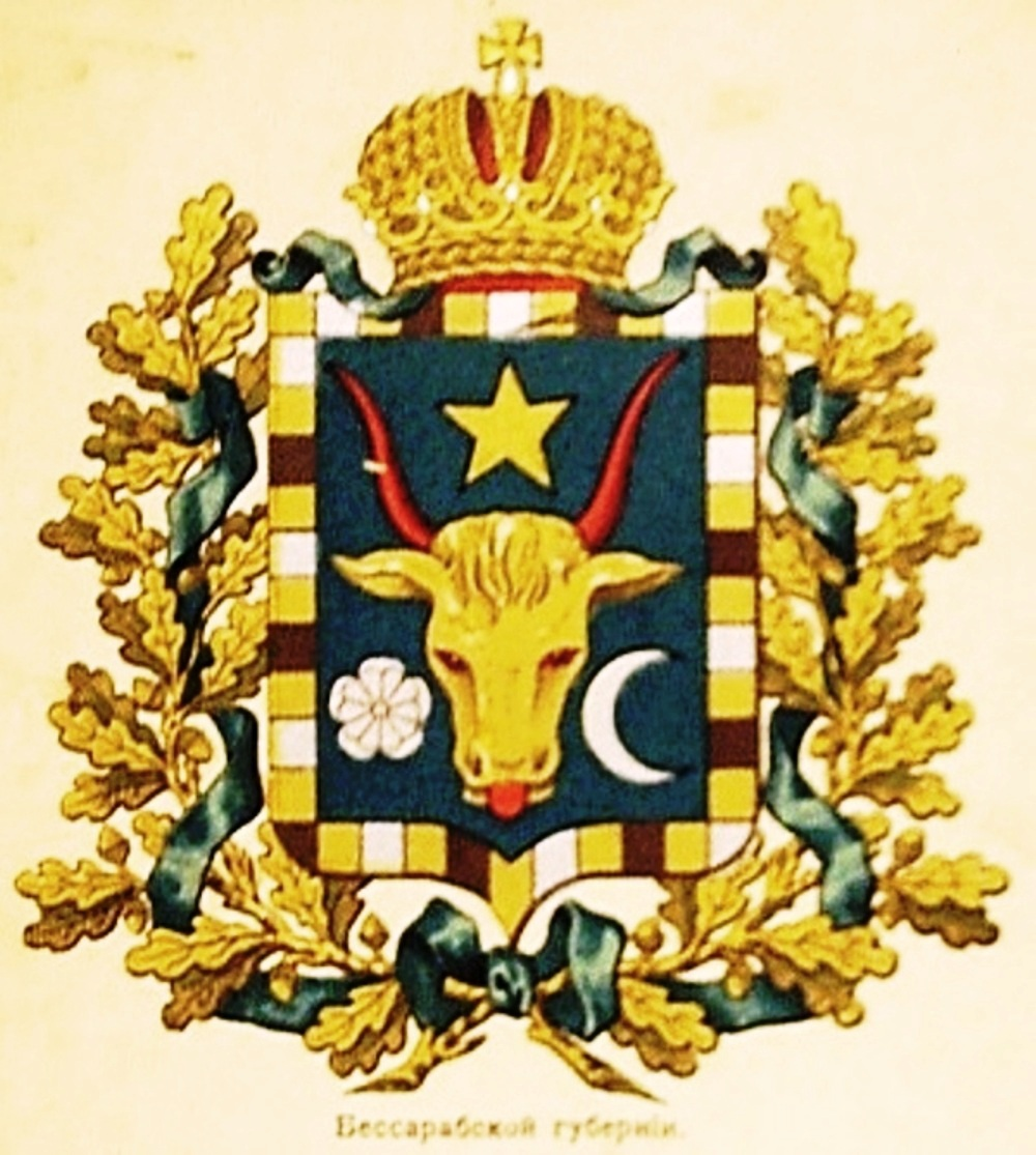 Russian Empire coat of arms Bessarabia Governorate. Paper non-post card of Russian Empire. Герб Российской Империи Бессарабской губернии издания Сукачова, СПб. Непочтовая карточка Российской Империи.